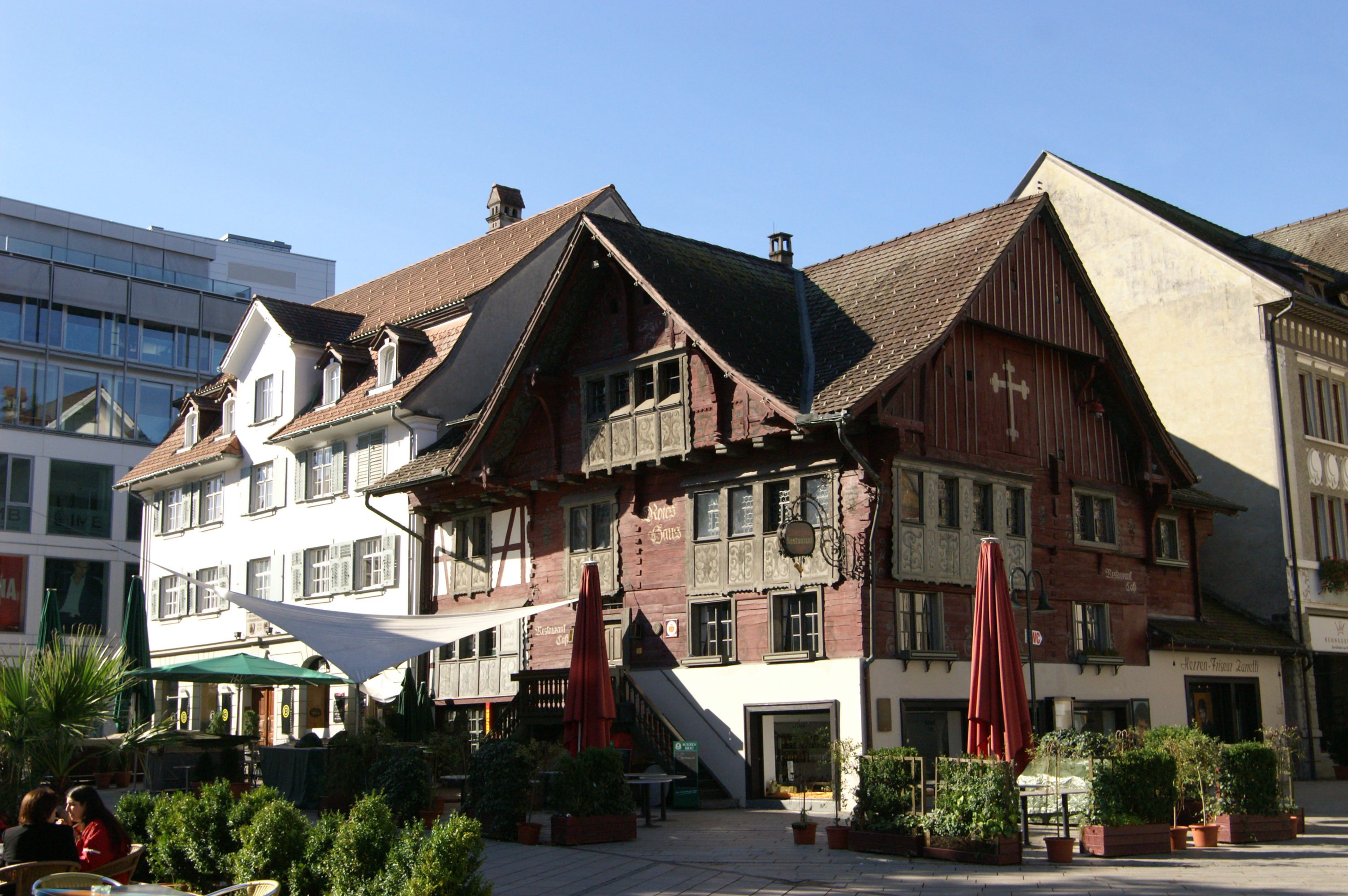 Dornbirn Marktplatz Rotes Haus erbaut1639